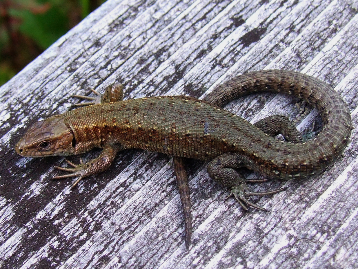 Zootoca vivipara